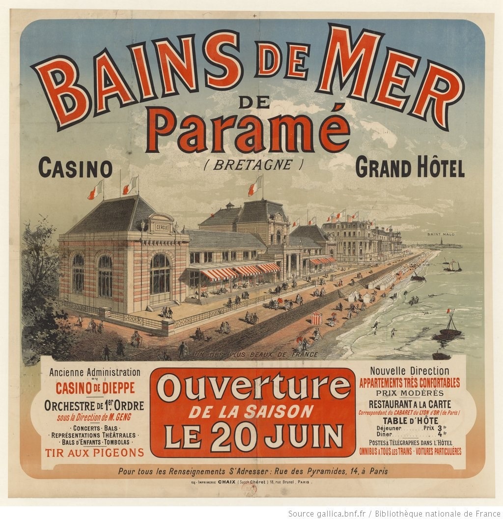 Publicité pour les Bains de mer de Paramé (Bretagne)